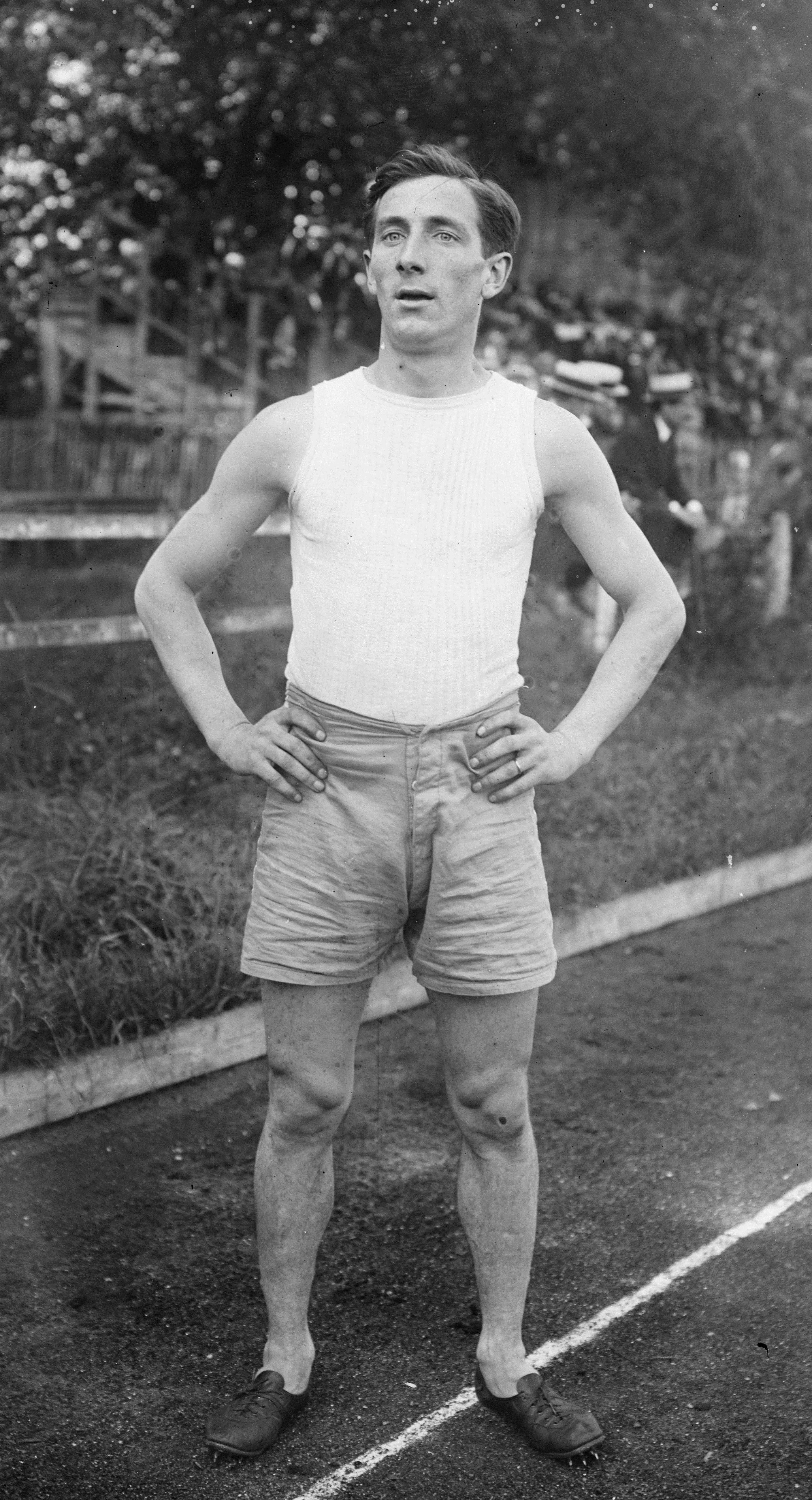 Bayon [Eugène, coureur français du 400 mètres, sélection olympique à Colombes, le 1er août 1920].